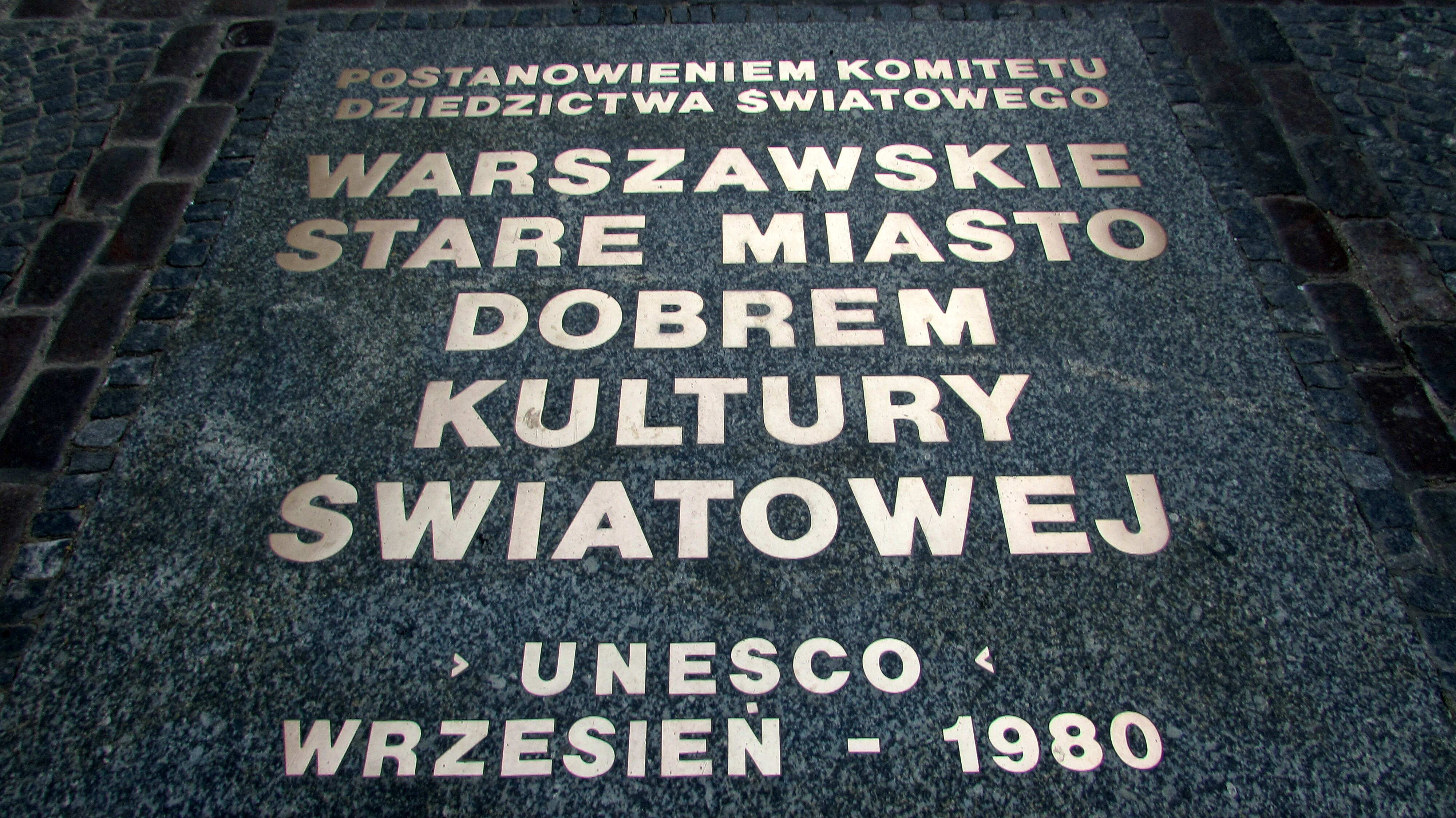 Warschau Weltkulturerbe